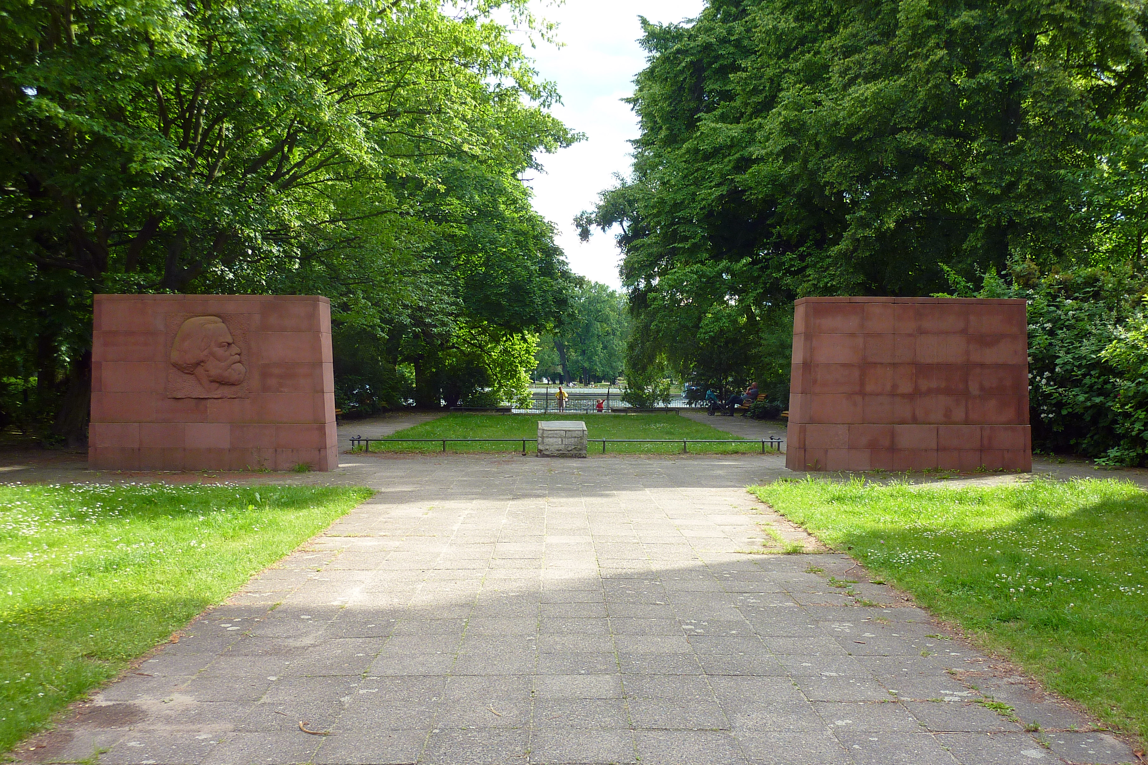 Karl-Marx-Erinnerungsstätte in Berlin-Stralau. Von der Straße Alt-Stralau aus gesehen.